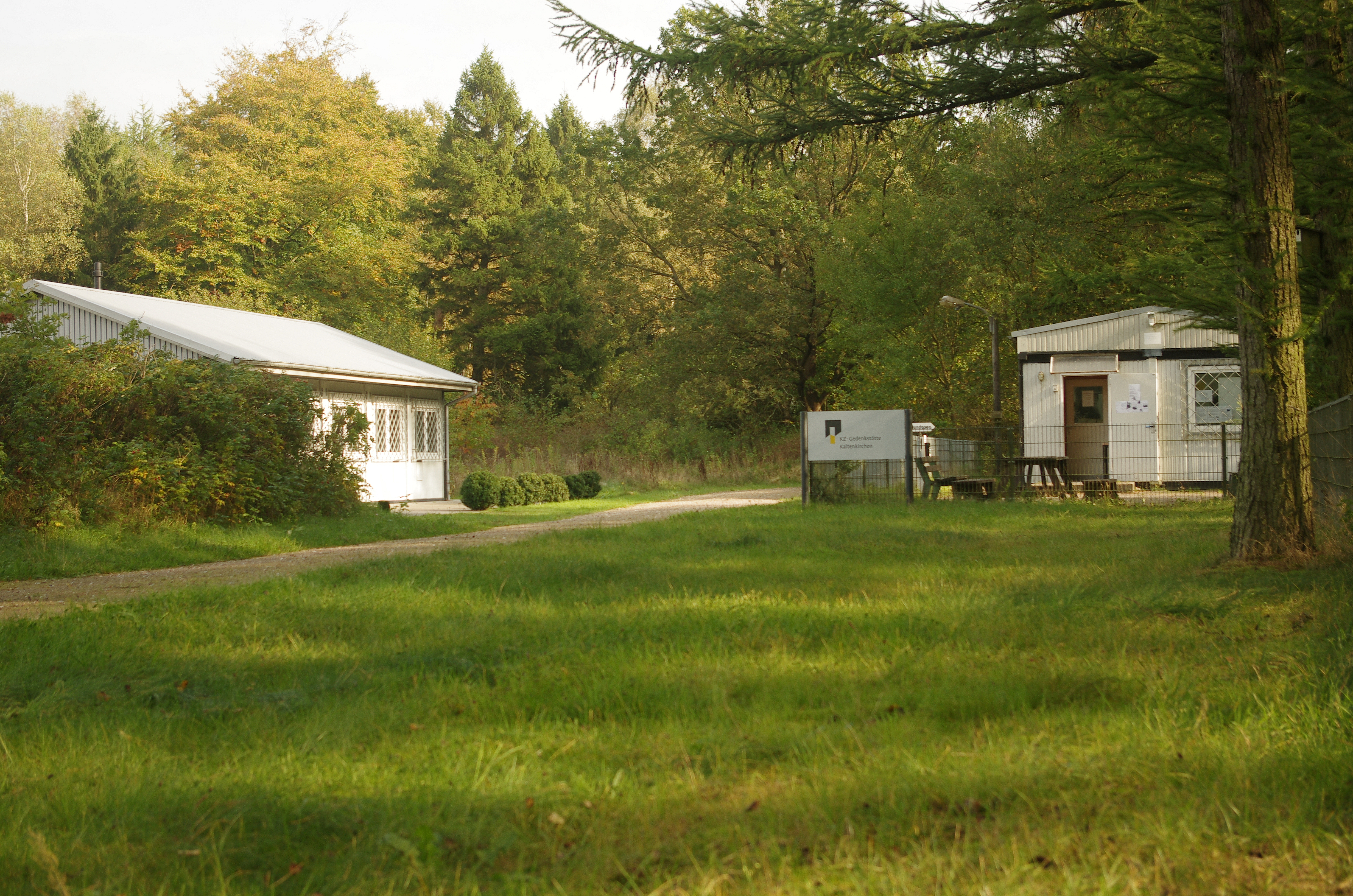 Gedenkstätte KZ Kaltenkirchen, Eingang mit Informations- und Besuchergebäuden